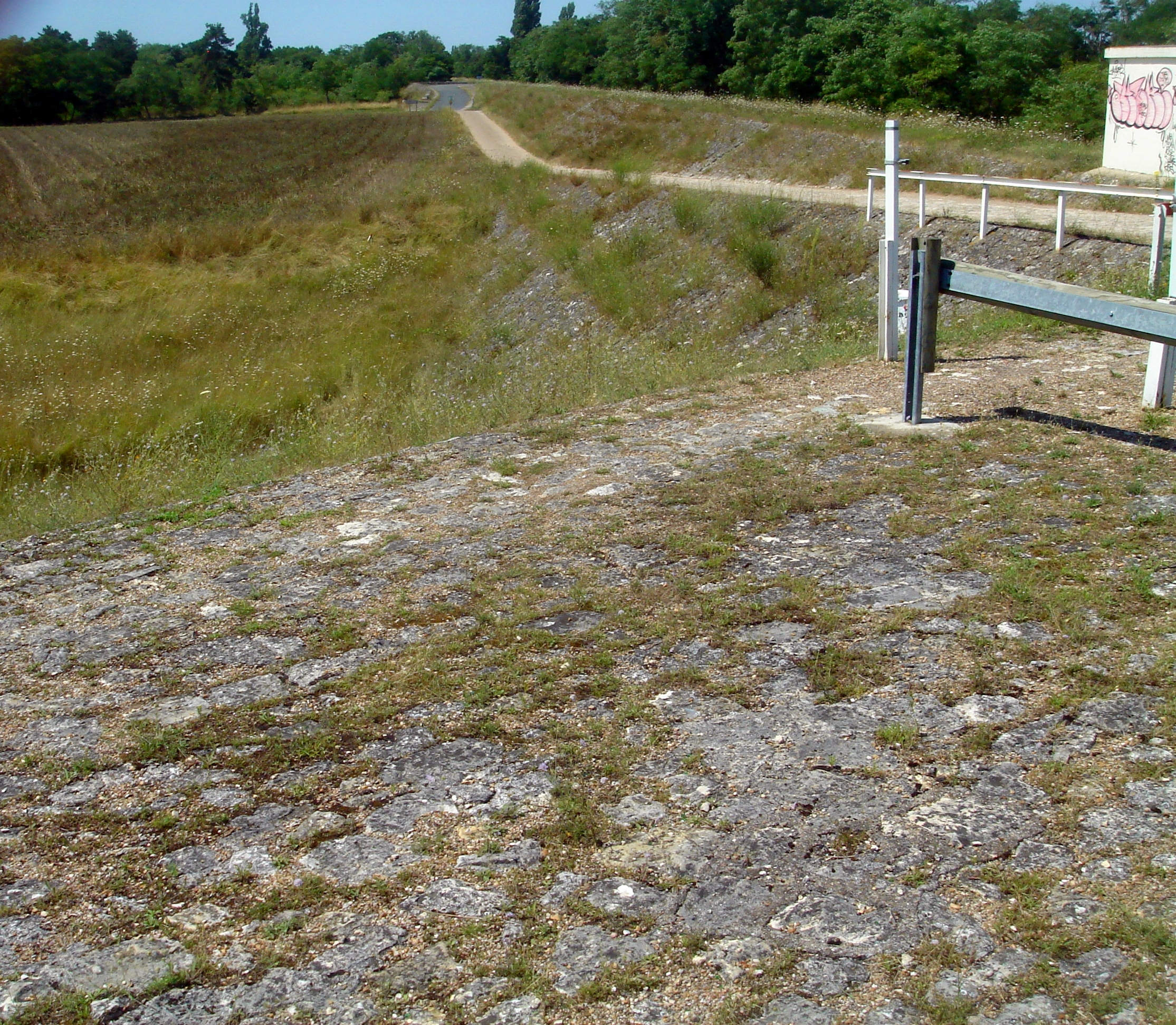 Déversoir de Jargeau, Loiret, France Vallée de la Loire